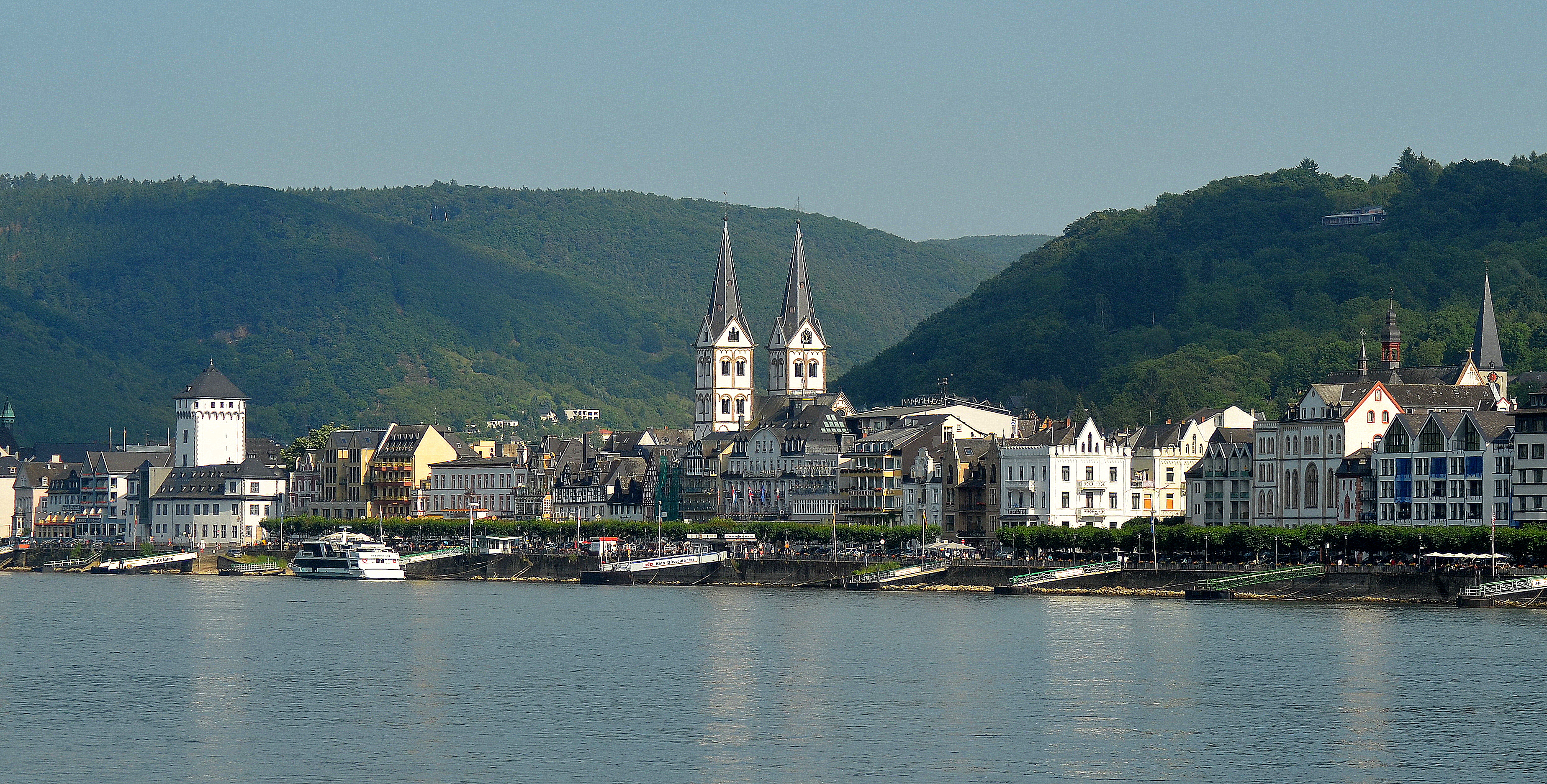 Boppard Stadszicht vanuit het noorden